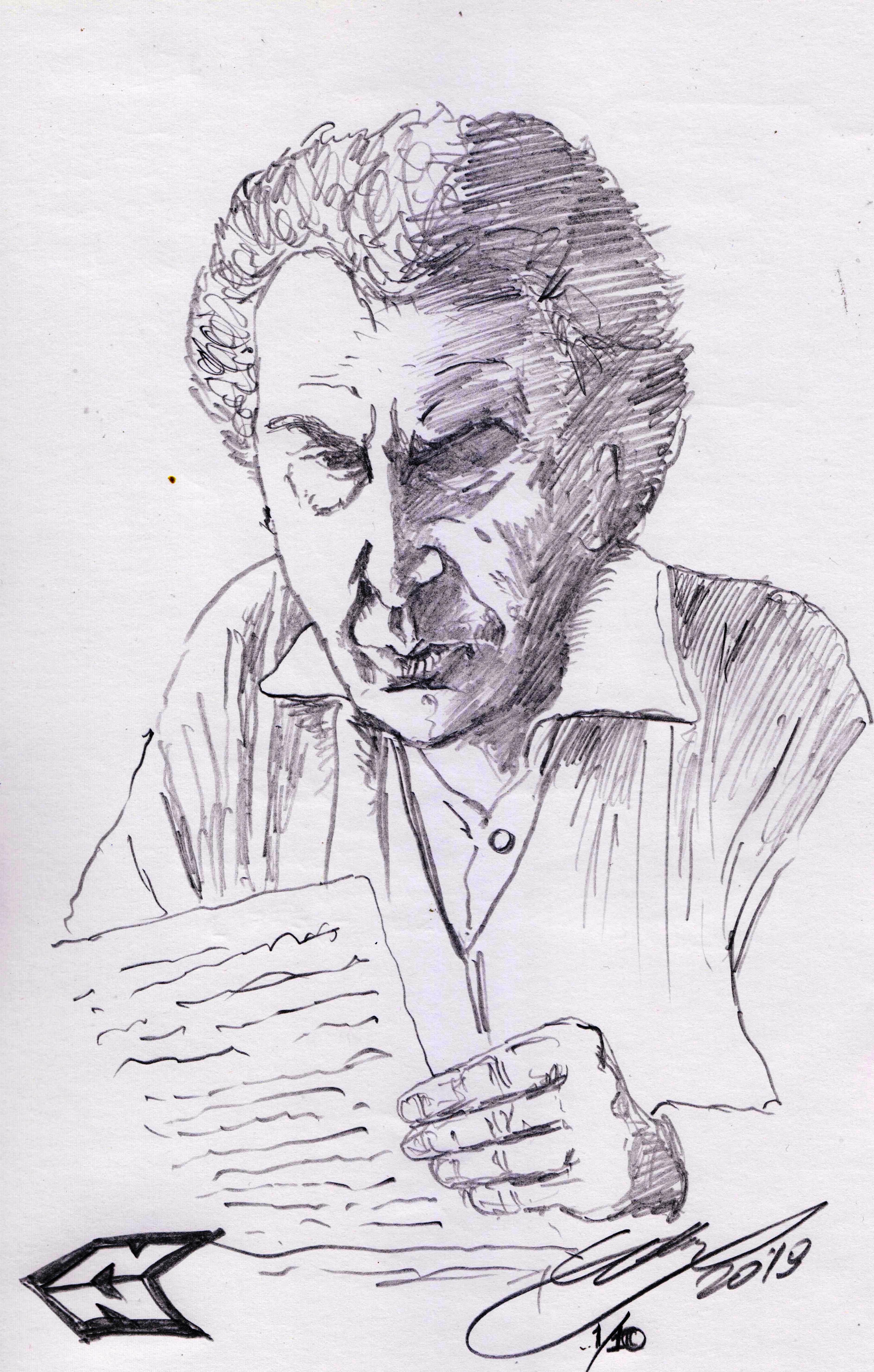 Σχέδιο με μολύβι σε λευκό χαρτί